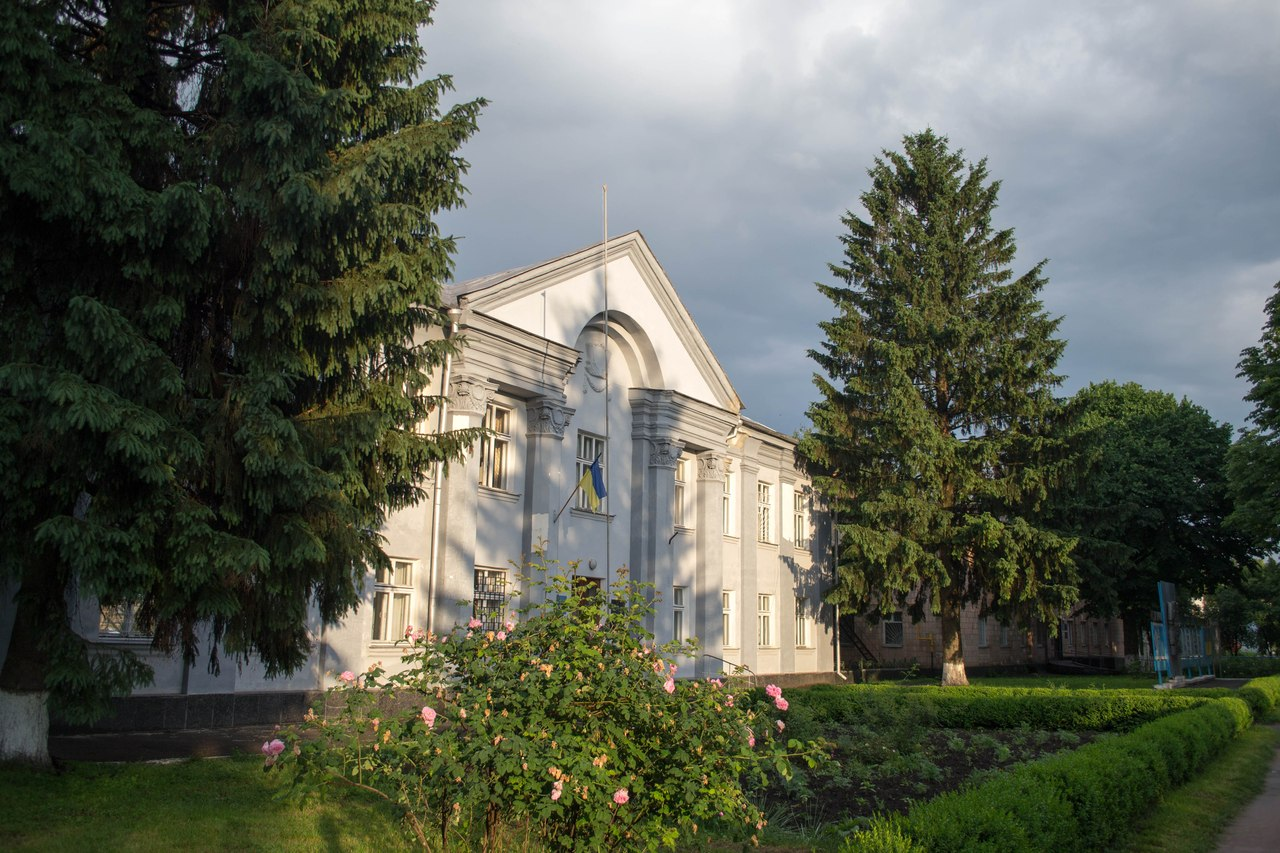 адміністрація